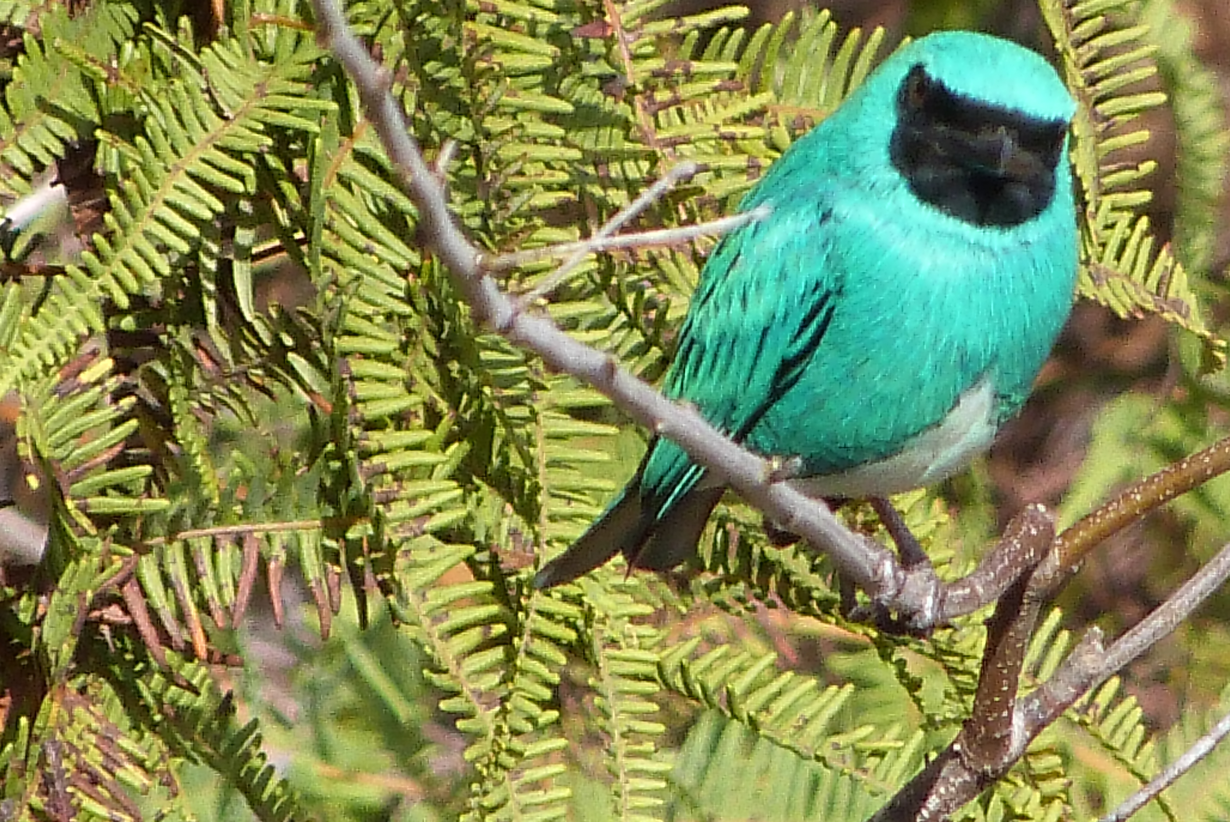 Foto tirada em Entre Rios - MG